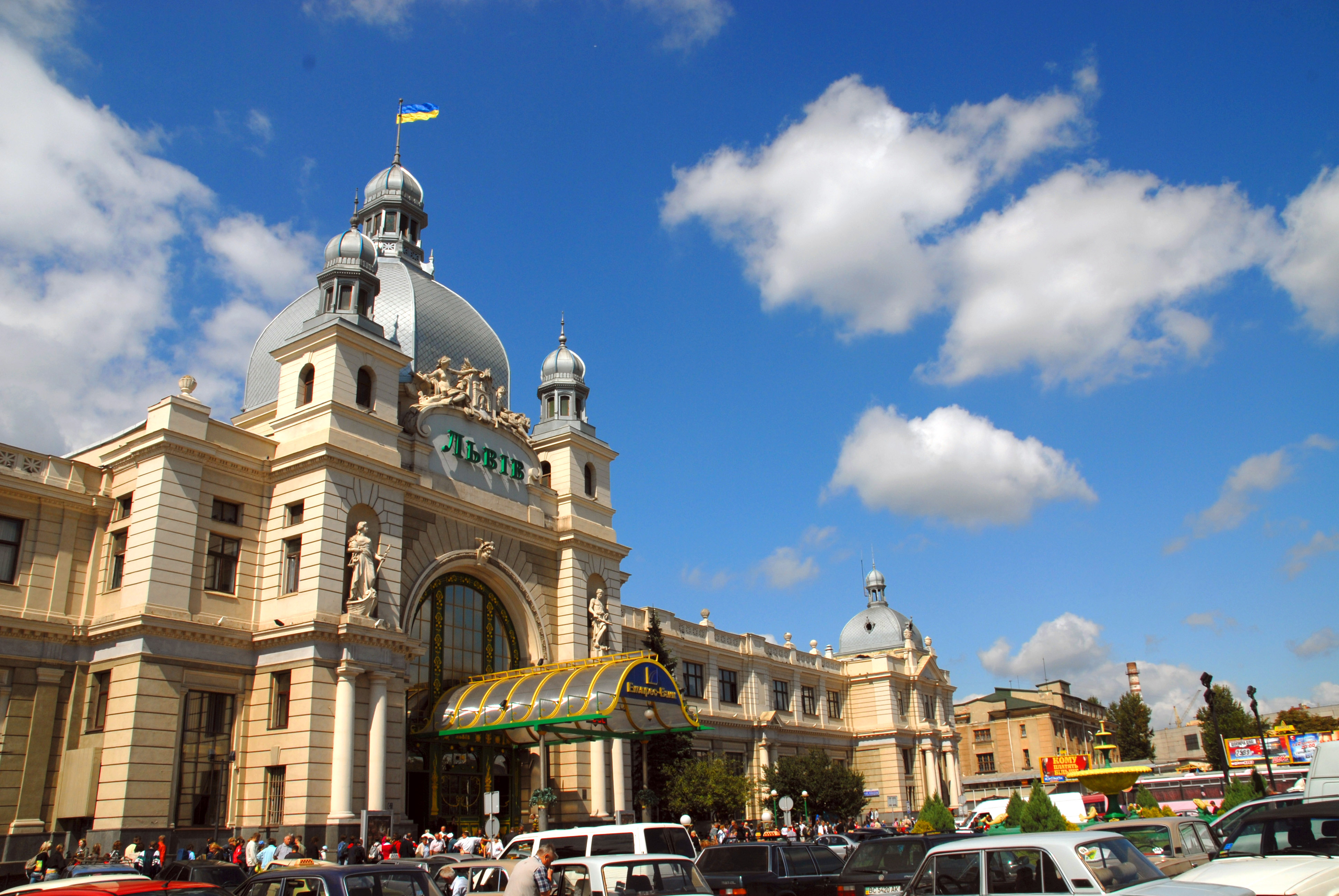 зал. двірець, Львів, Двірцева пл.